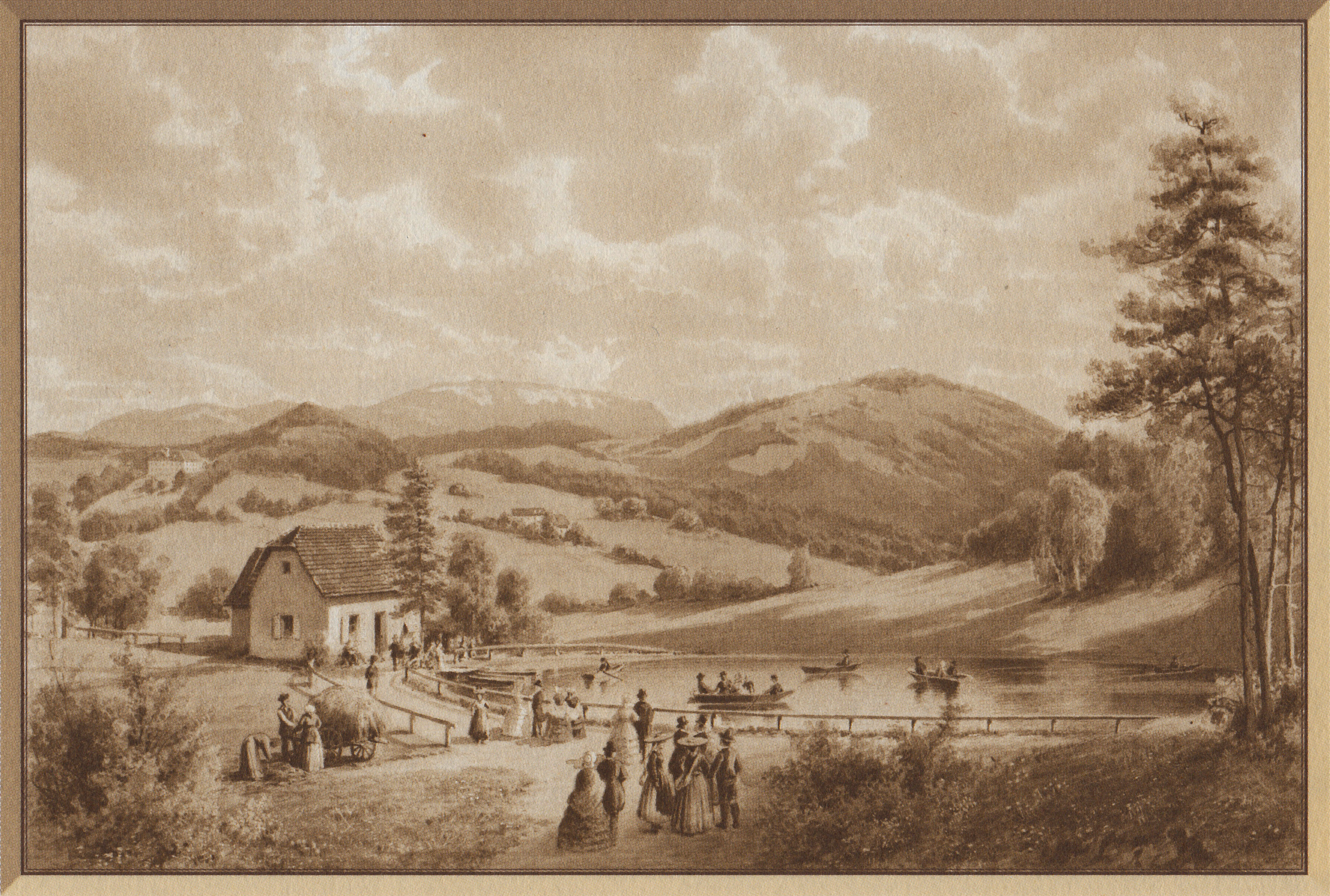 Hilmteich in Graz, Reproduktion eines Aquarells von Heinrich Bank durch das Steiermärkische Landesarchiv